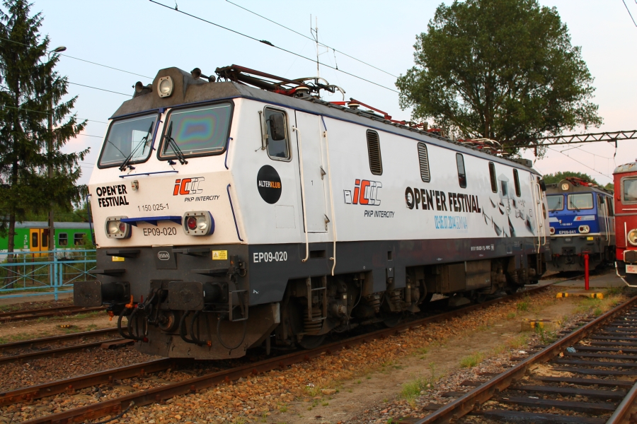 Lokomotywa elektryczna EP09-020 na terenie stacji postojowej Warszawa Grochów.